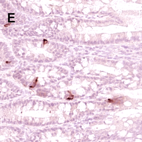 Figura 3. Micrografías representativas de la morfología intestinal y la inmunohistoquímica GLP-2